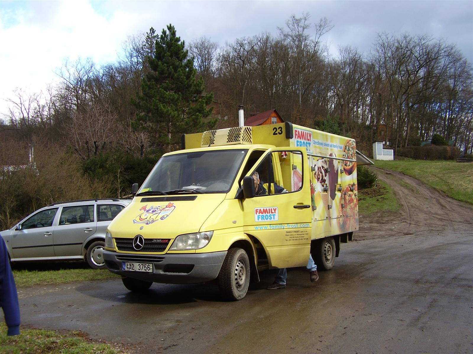 Pojízdný obchod s mraženými výrobky Family Frost v osadě pod Masečínem u Štěchovic